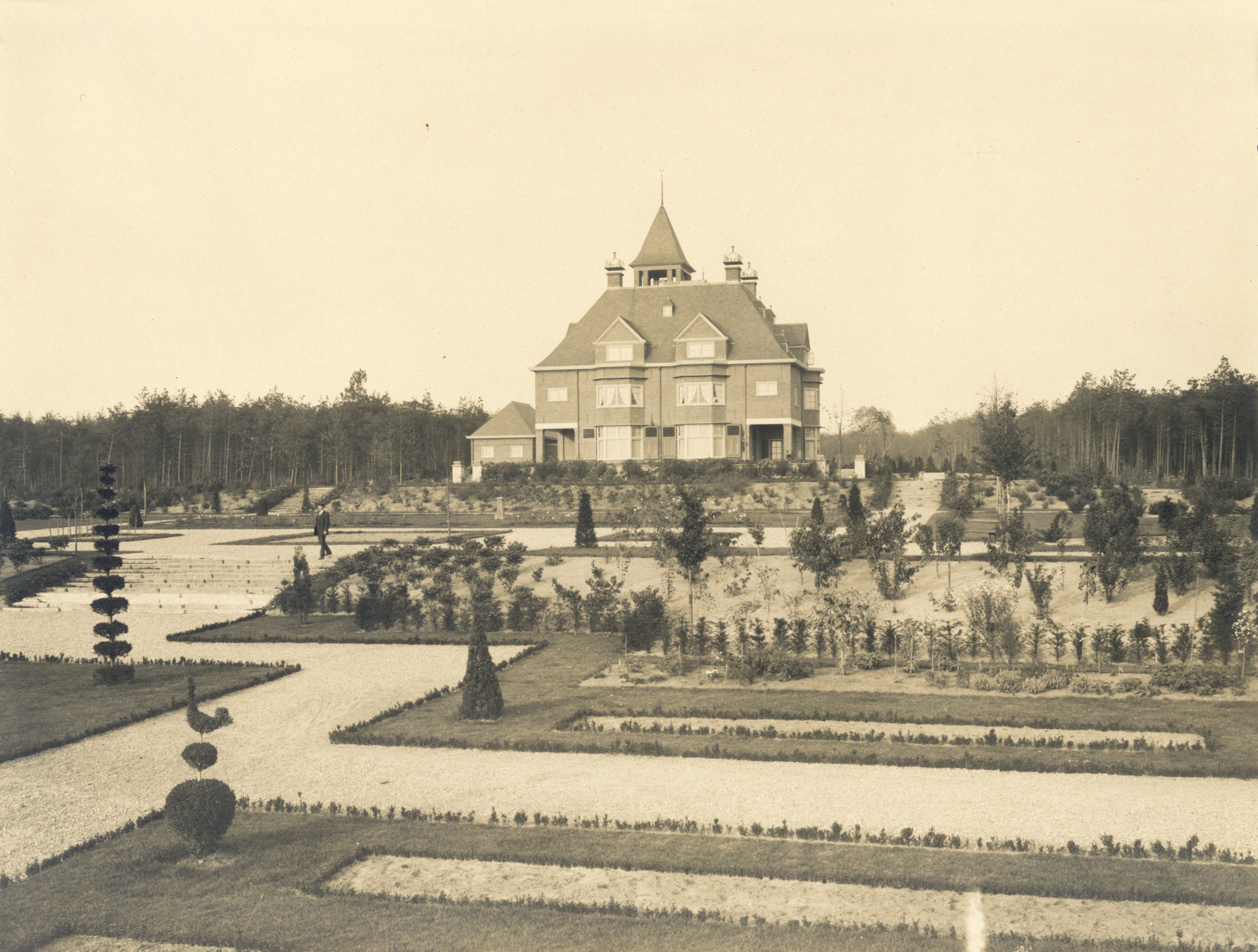 Gezicht op de achtergevel van het landhuis De Ruiterberg met omringende geometrische tuin (Maarsbergseweg 6) te Doorn uit het zuiden. 1927